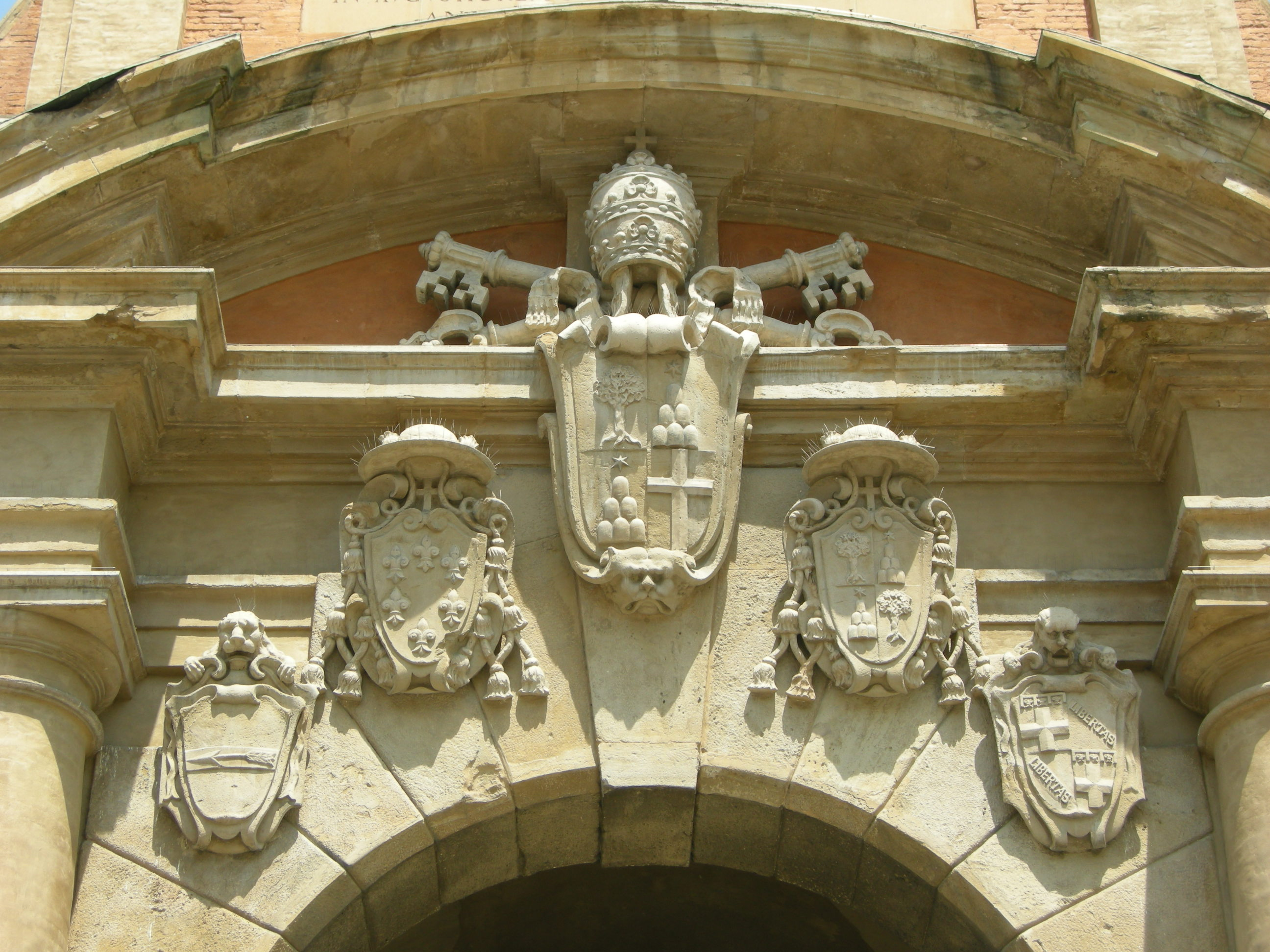 Porta Galliera. Fornice meridionale, recante gli stemmi del papa Alessandro VII (papa dal 1655 al 1677; notare che nell'ultimo quarto l'abituale quercia è sostituita dallo scudo crociato di Bologna), del cardinale legato Girolamo Farnese (in carica: 1658-1662), del cardinale nipote Flavio Chigi (prefetto della Sacra Congregazione dei Confini dello Stato ecclesiastico / Sovrintendente generale dello Stato ecclesiastico), di un Bonfioli e del Comune di Bologna.